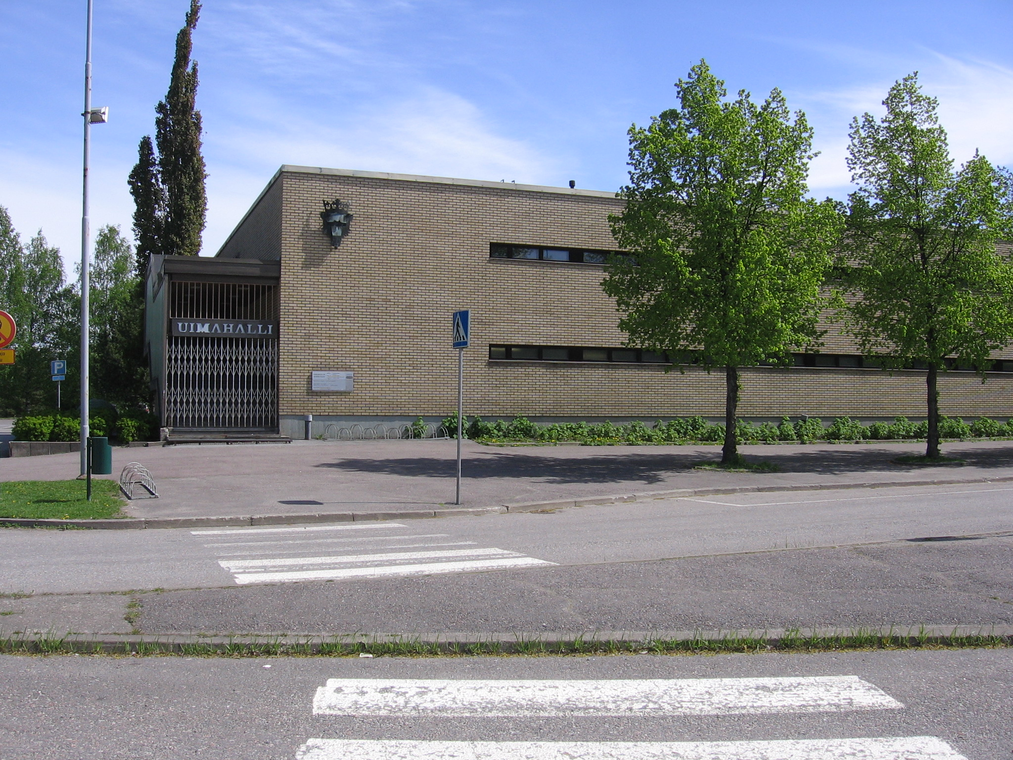 Porin uimahalli